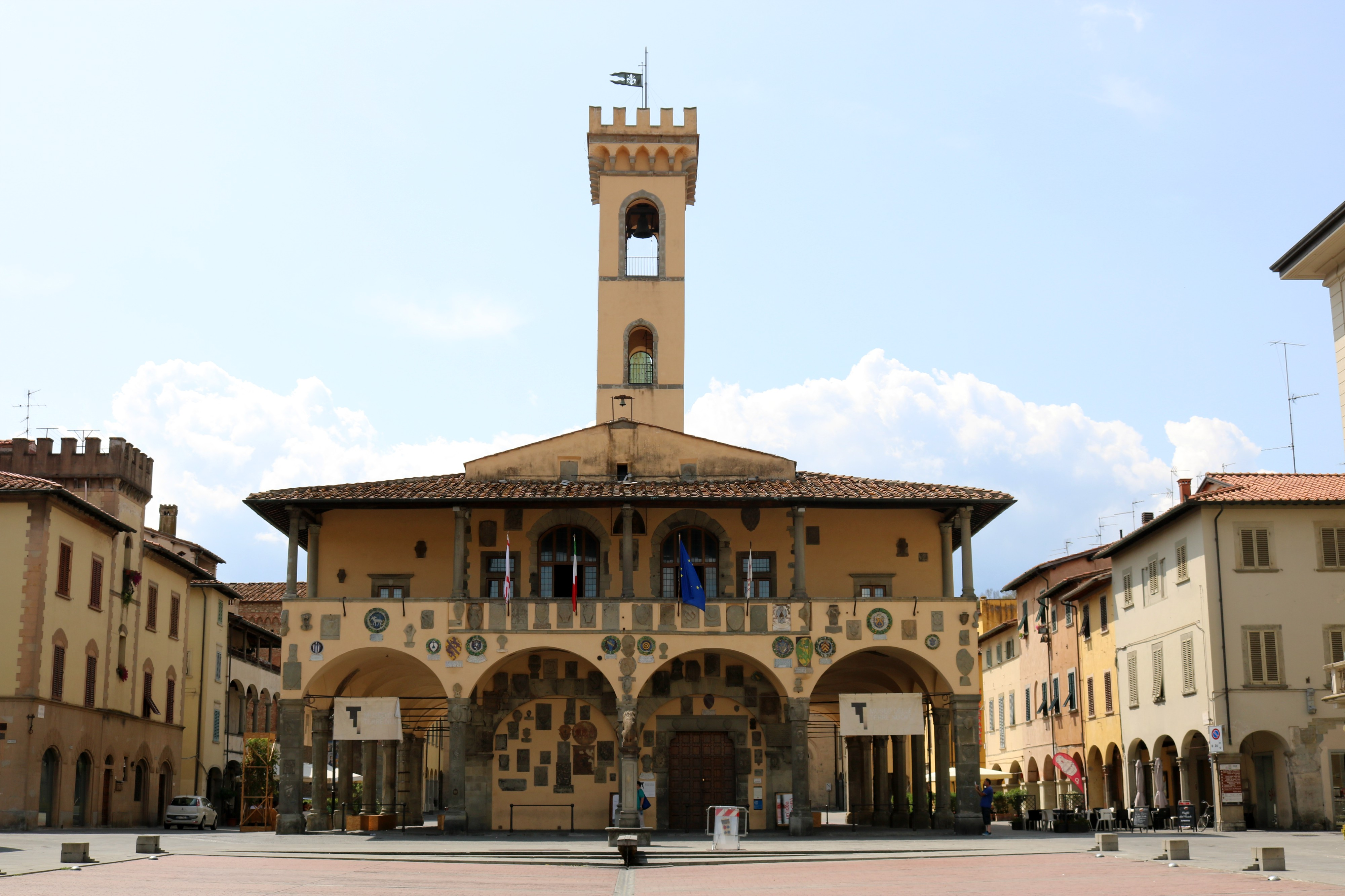 Palazzo d'Arnolfo This is a photo of a monument which is part of cultural heritage of Italy.